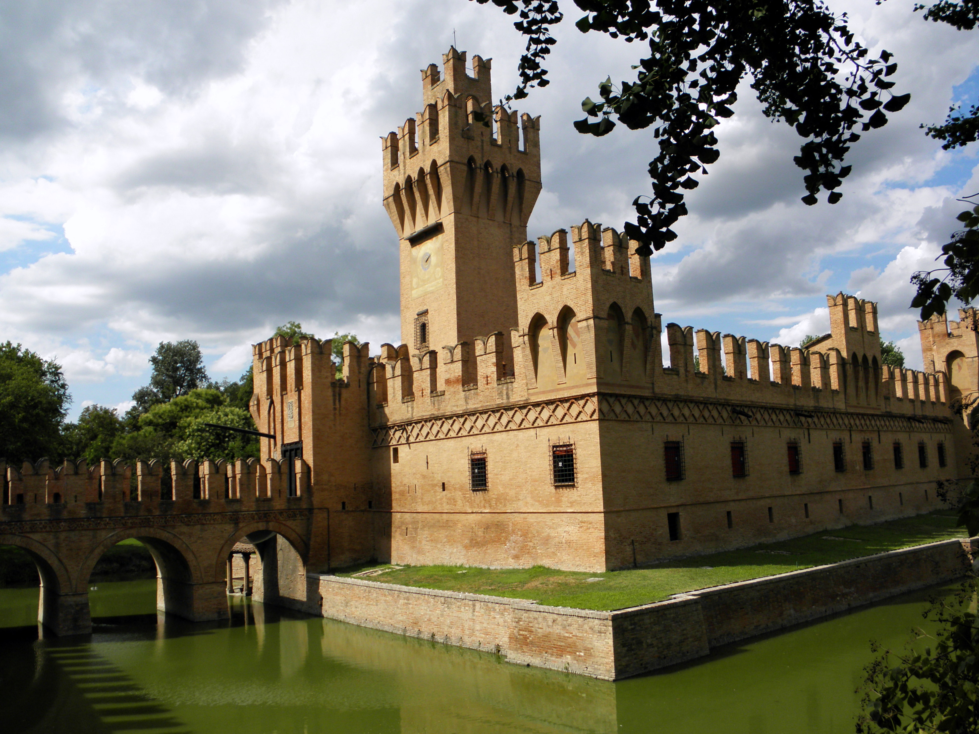 San Martino in Soverzano, frazione di Minerbio: il Castello di San Martino in Soverzano detto anche “dei Manzoli”.